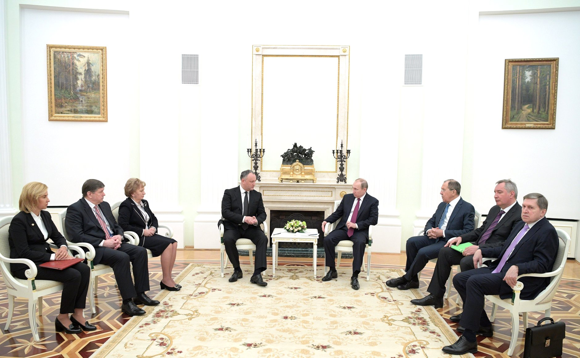 Президент России Владимир Путин с Президентом Молдовы Игорем Додоном во время переговоров